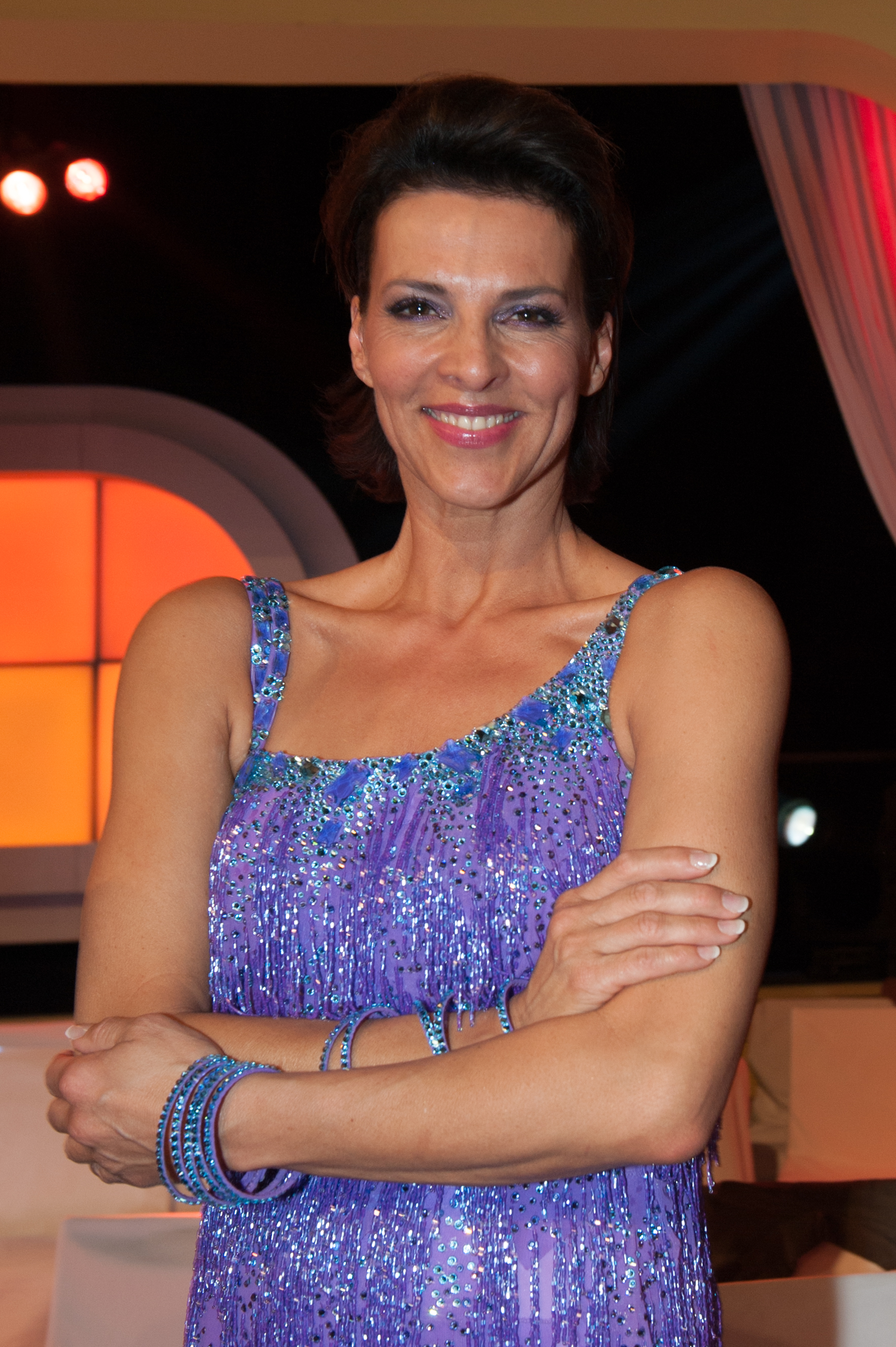 ORF Dancing Stars - Erste Entscheidung am 18. März 2016: Sabine Petzl